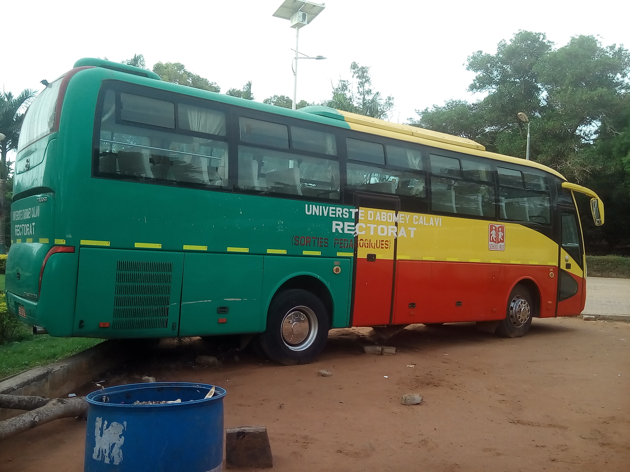 bus de l'UAC pour les évenements sportifs. This is an image with the theme "Africa on the Move or Transport" from: Benin